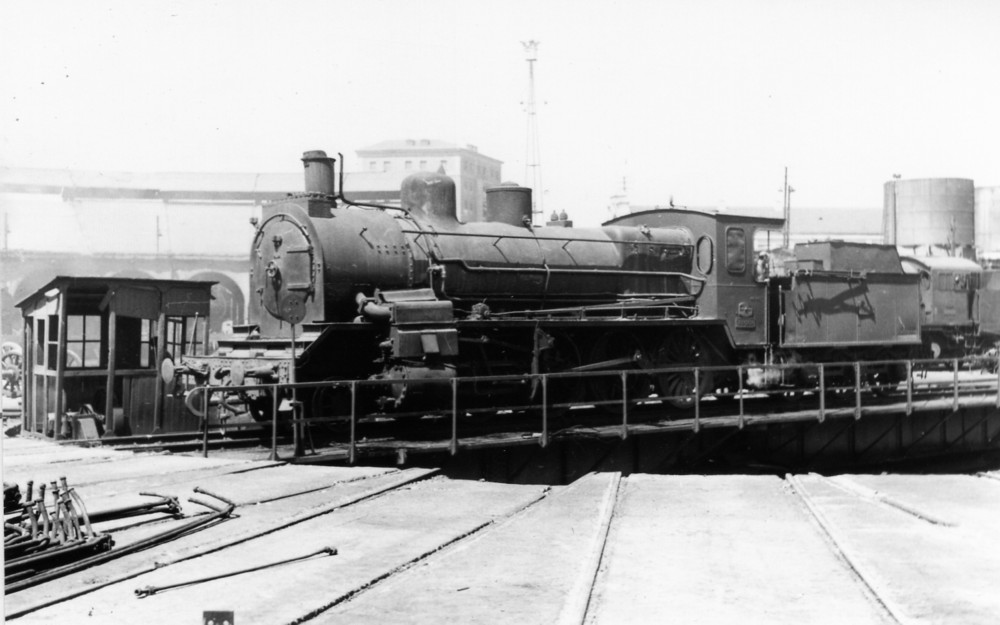 Locomotora Renfe Serie 140-2068 a 2471 en Valladolid.